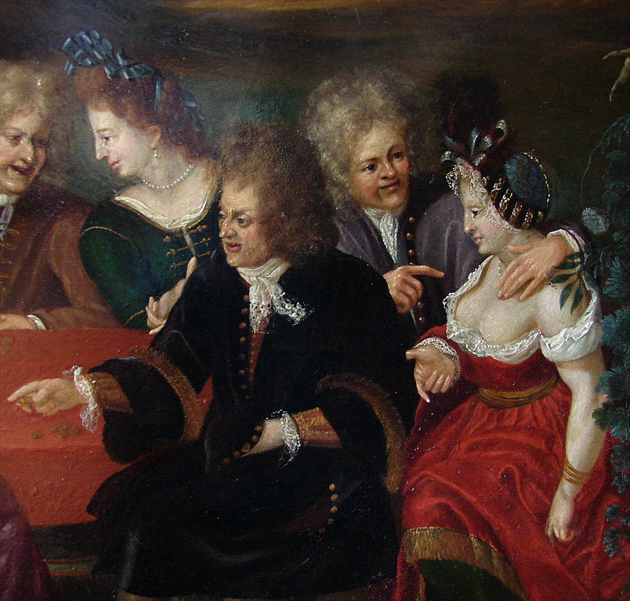 detail